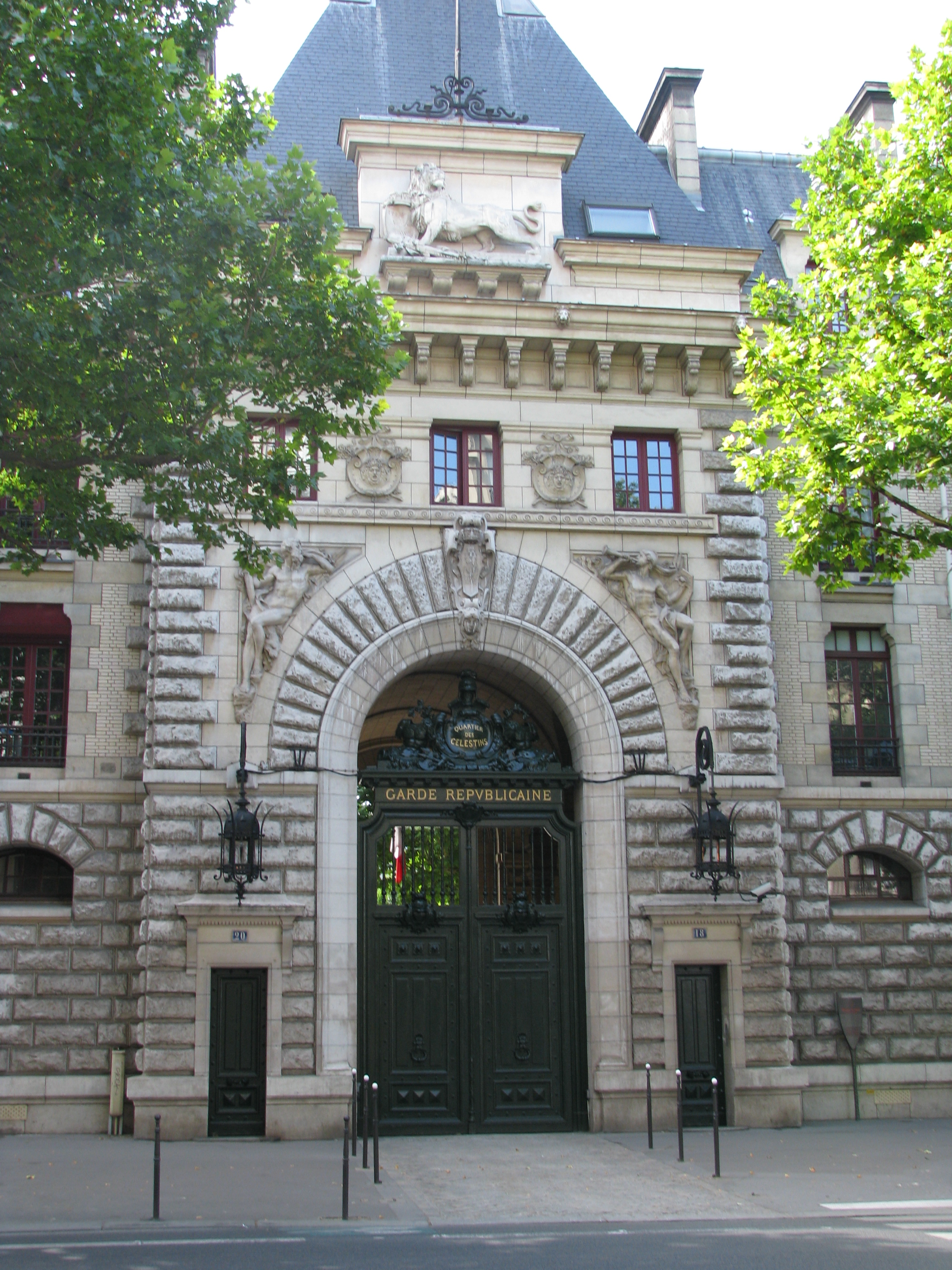 Caserne des Célestins, Paris